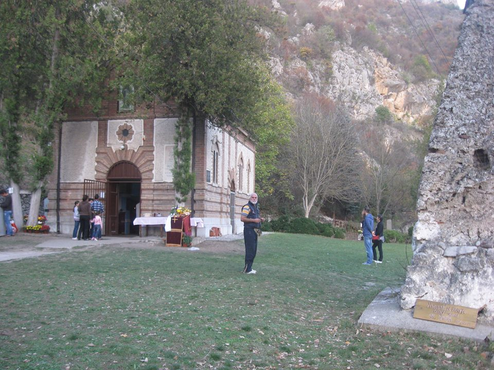 Srpski (latinica): Sićevačka klisura, Manastir Sv.Petka Iverica, pogled sa zapadne strane